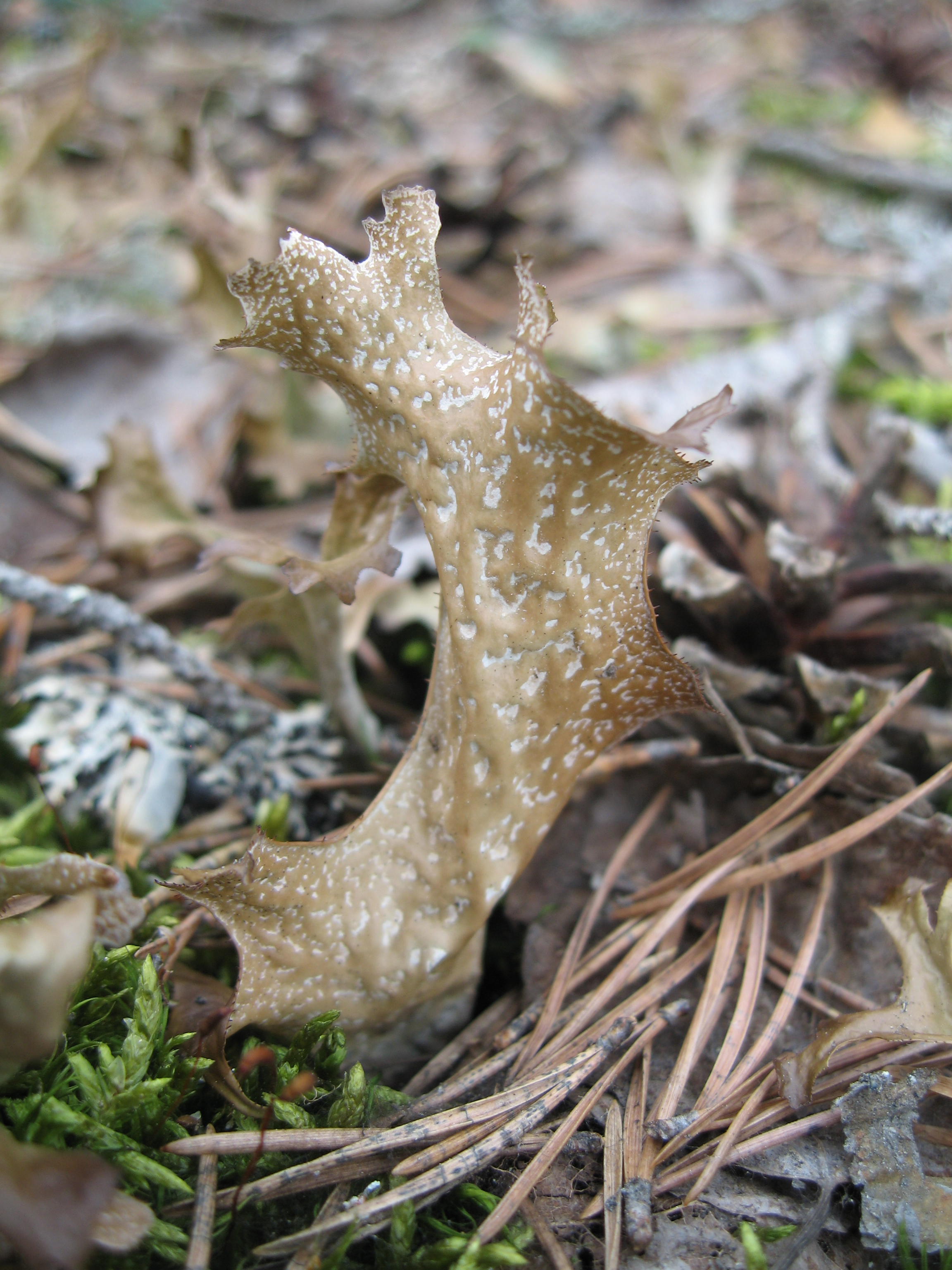 Dettaglio di Cetraria islandica con in evidenza le pseudocifelle Islandslav